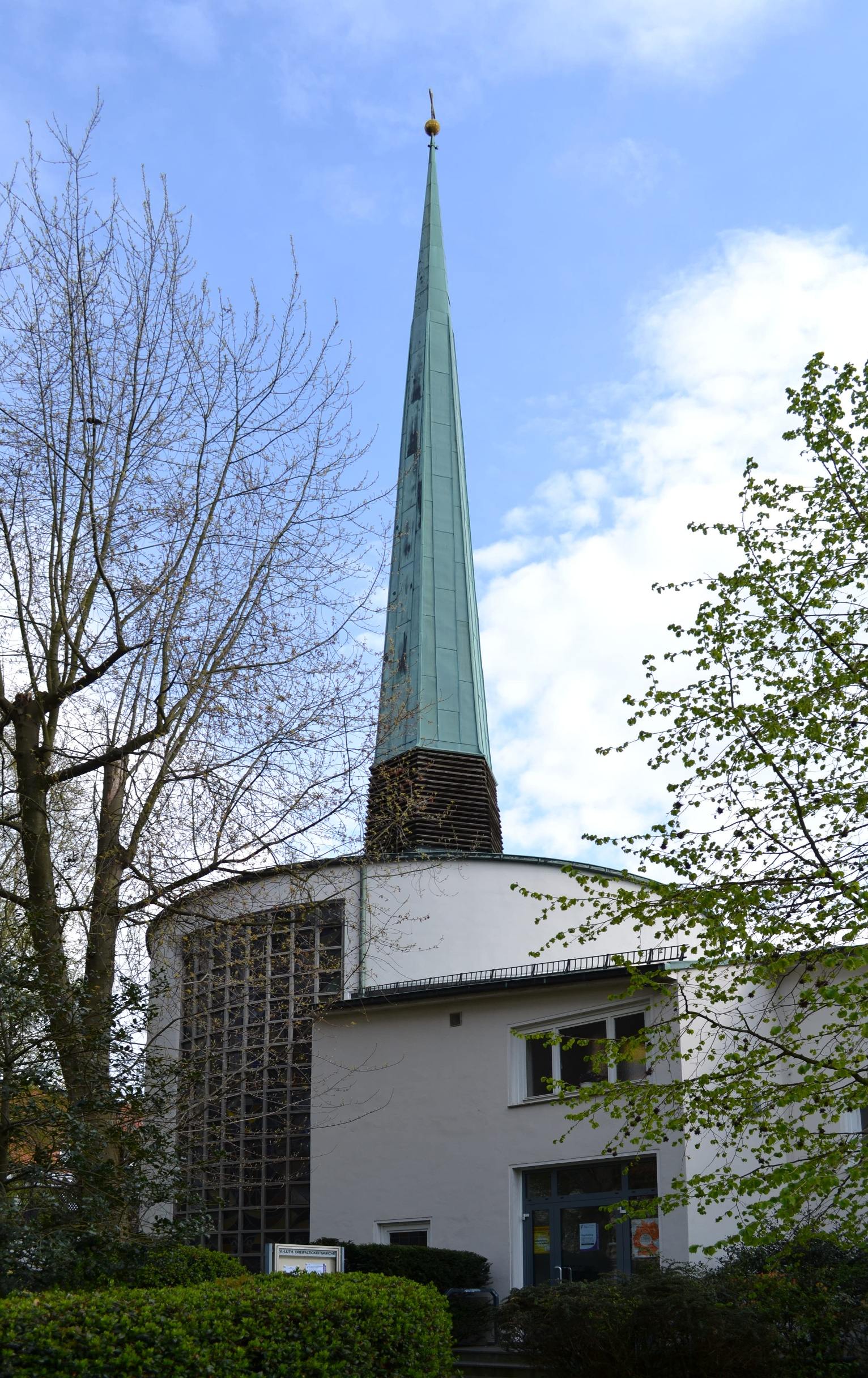 Evangelisch-Lutherische Dreifaltigkeitskirche, Detmold, Wittenberger Weg 4